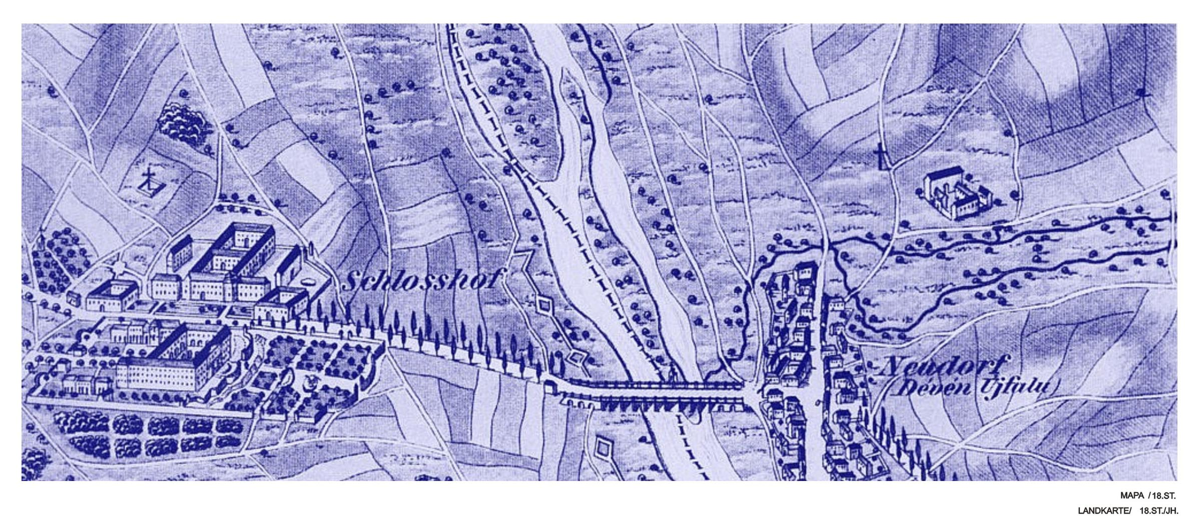 HISTORIA MOSTU